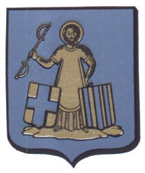 Wapen van Aartselaar, via de website ngw.nl